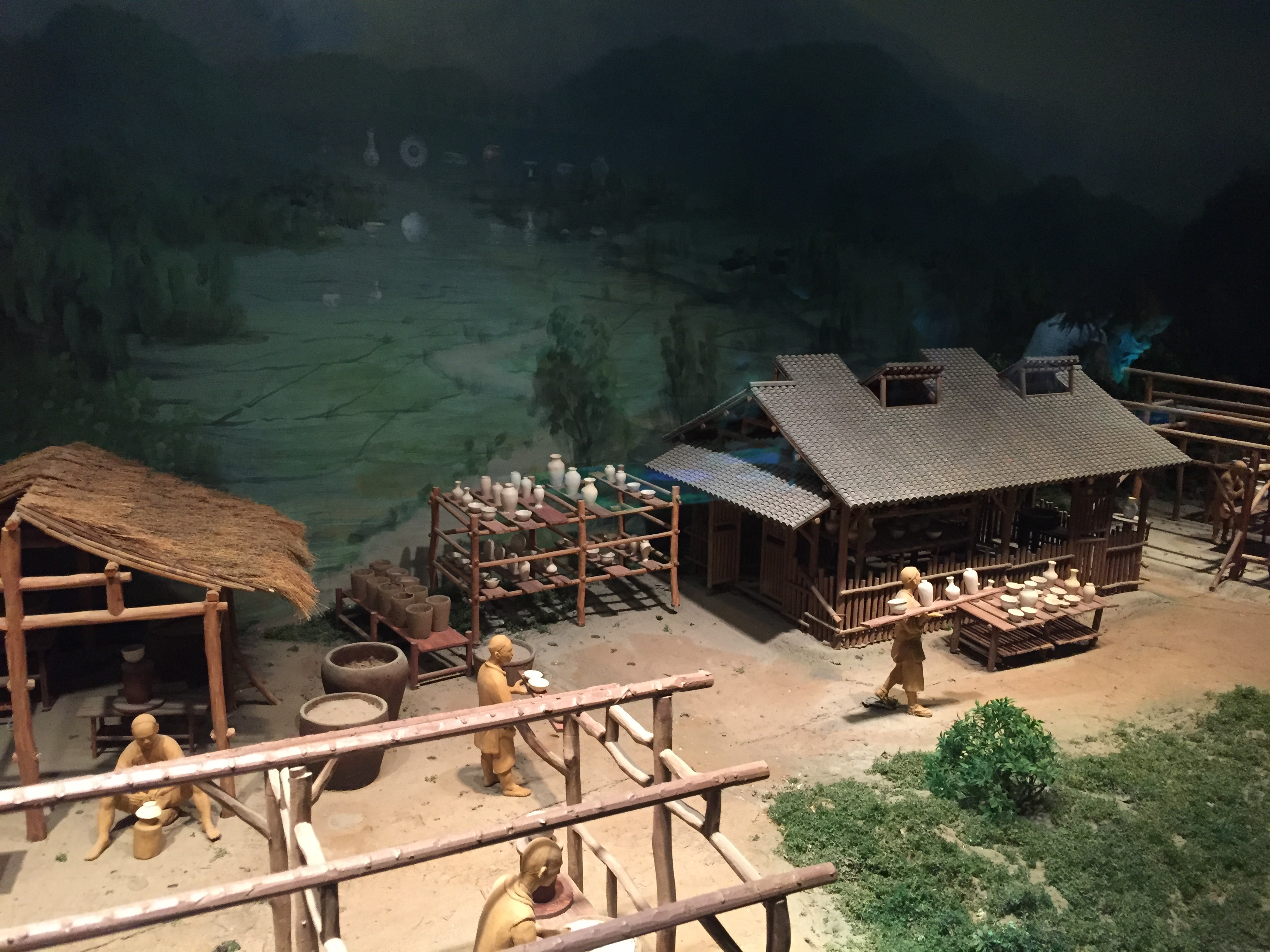 中文（中国大陆）: 辽宁省博物馆模拟制陶瓷场景